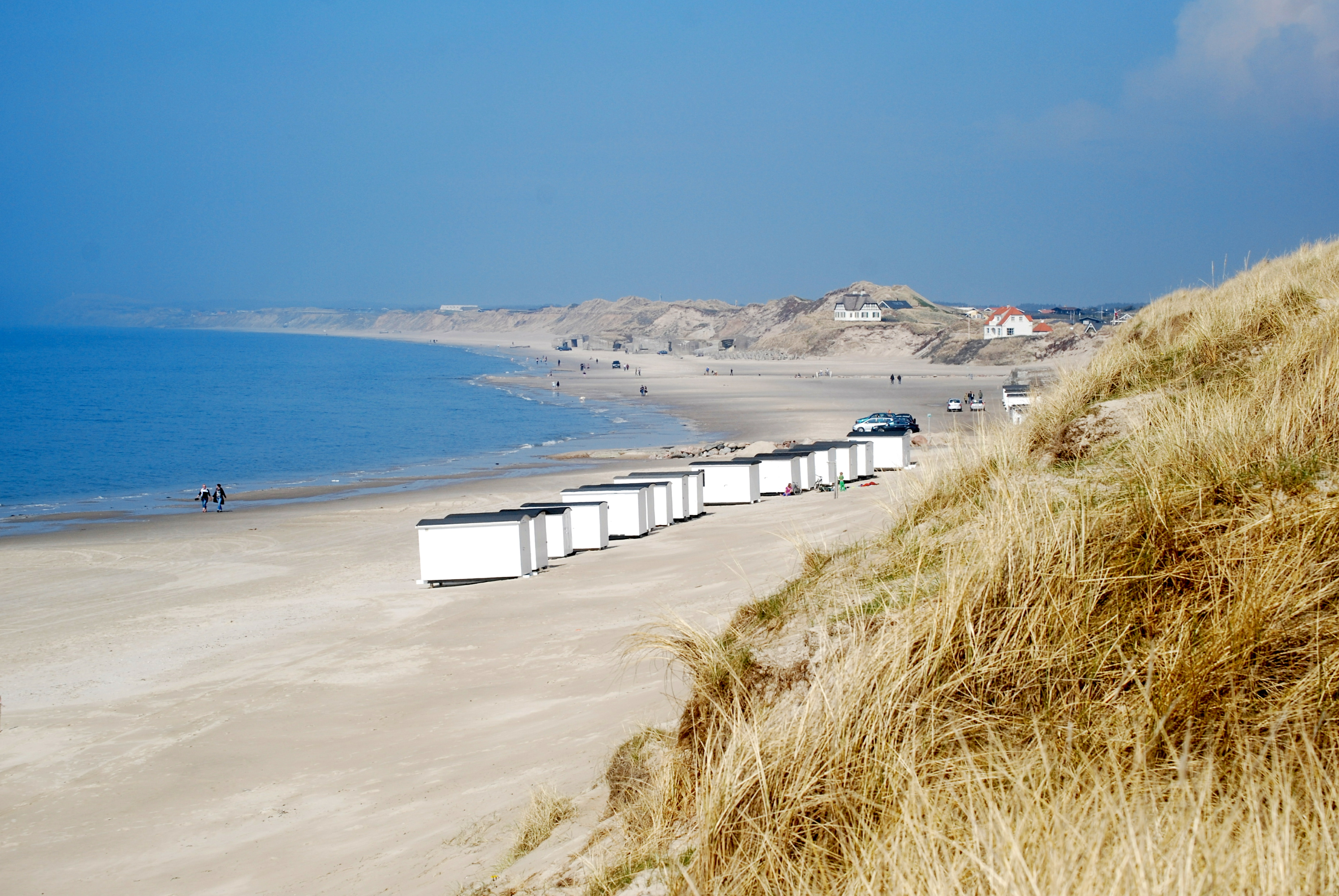 Løkken - Badehäuschen